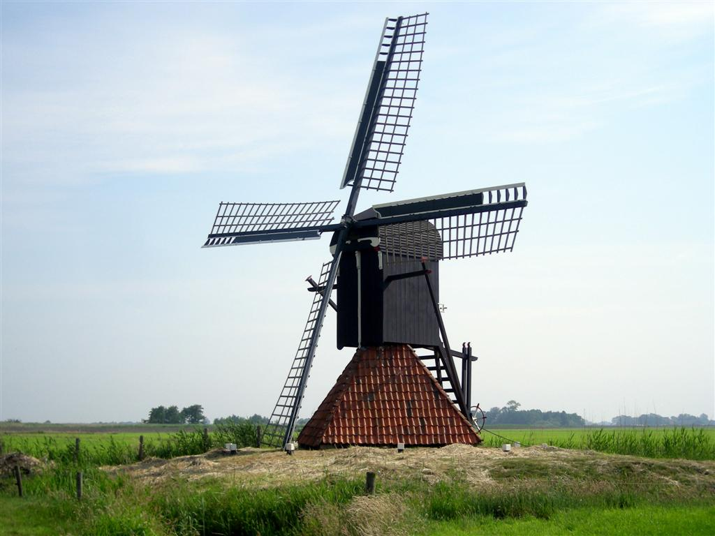 De Jansmolen in Goengahuizen